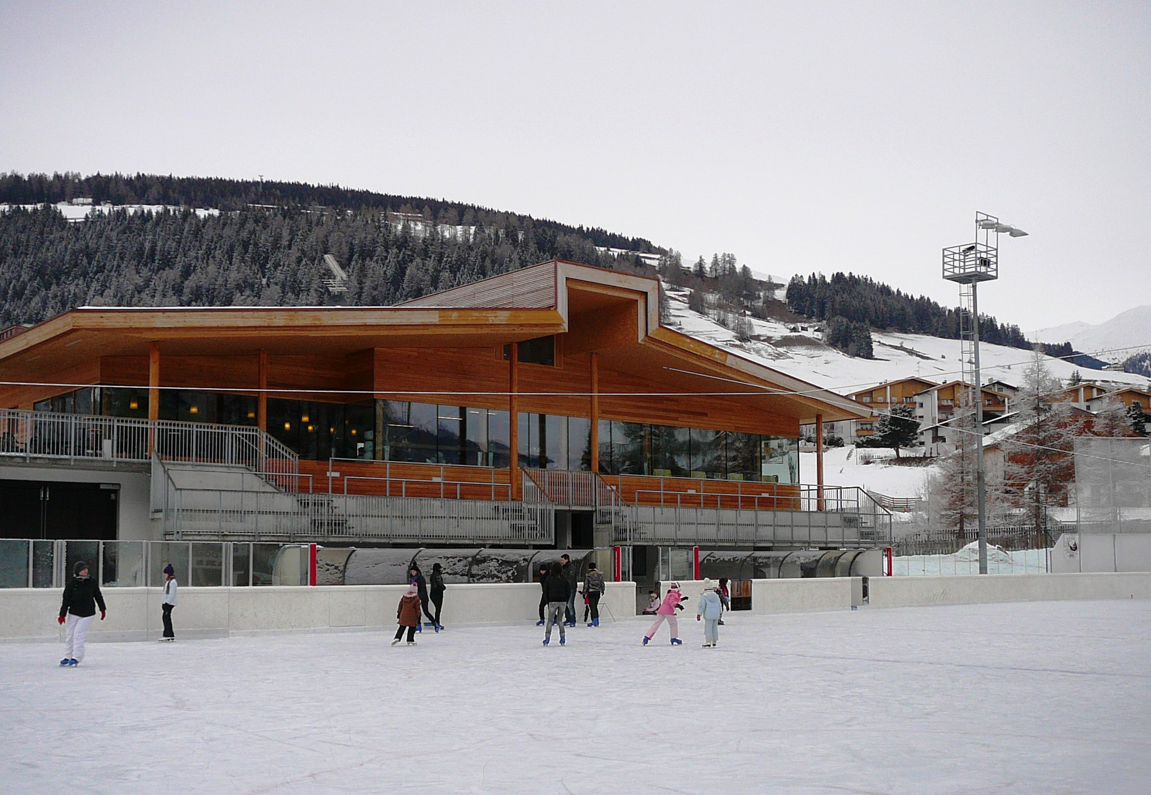 Stadio del Ghiaccio a Dobbiaco